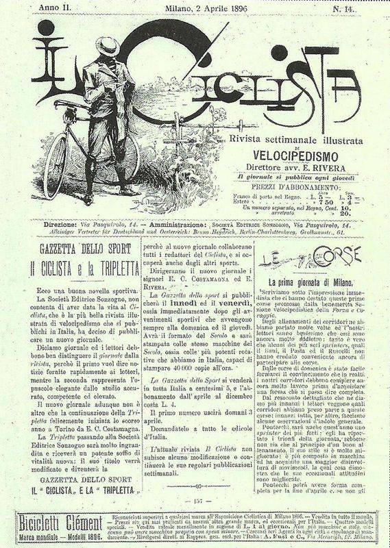 Edizione del 2 aprile 1896 del Ciclista in cui si annuncia la nascita della Gazzetta dello Sport.